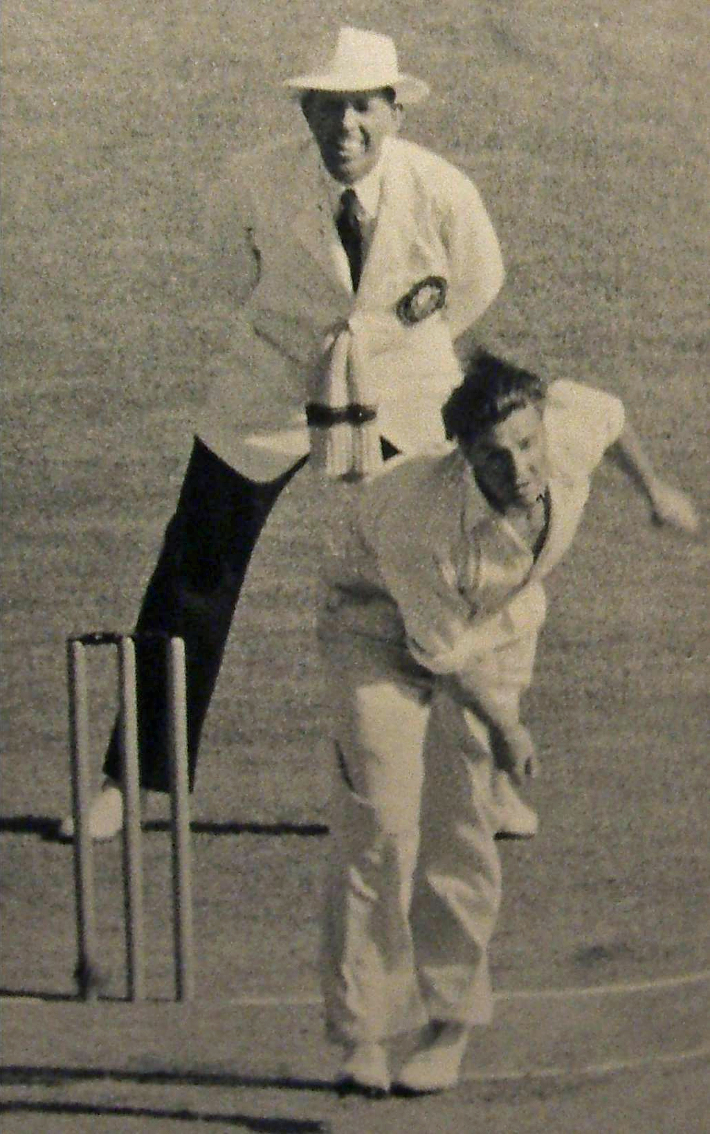 Keith Miller